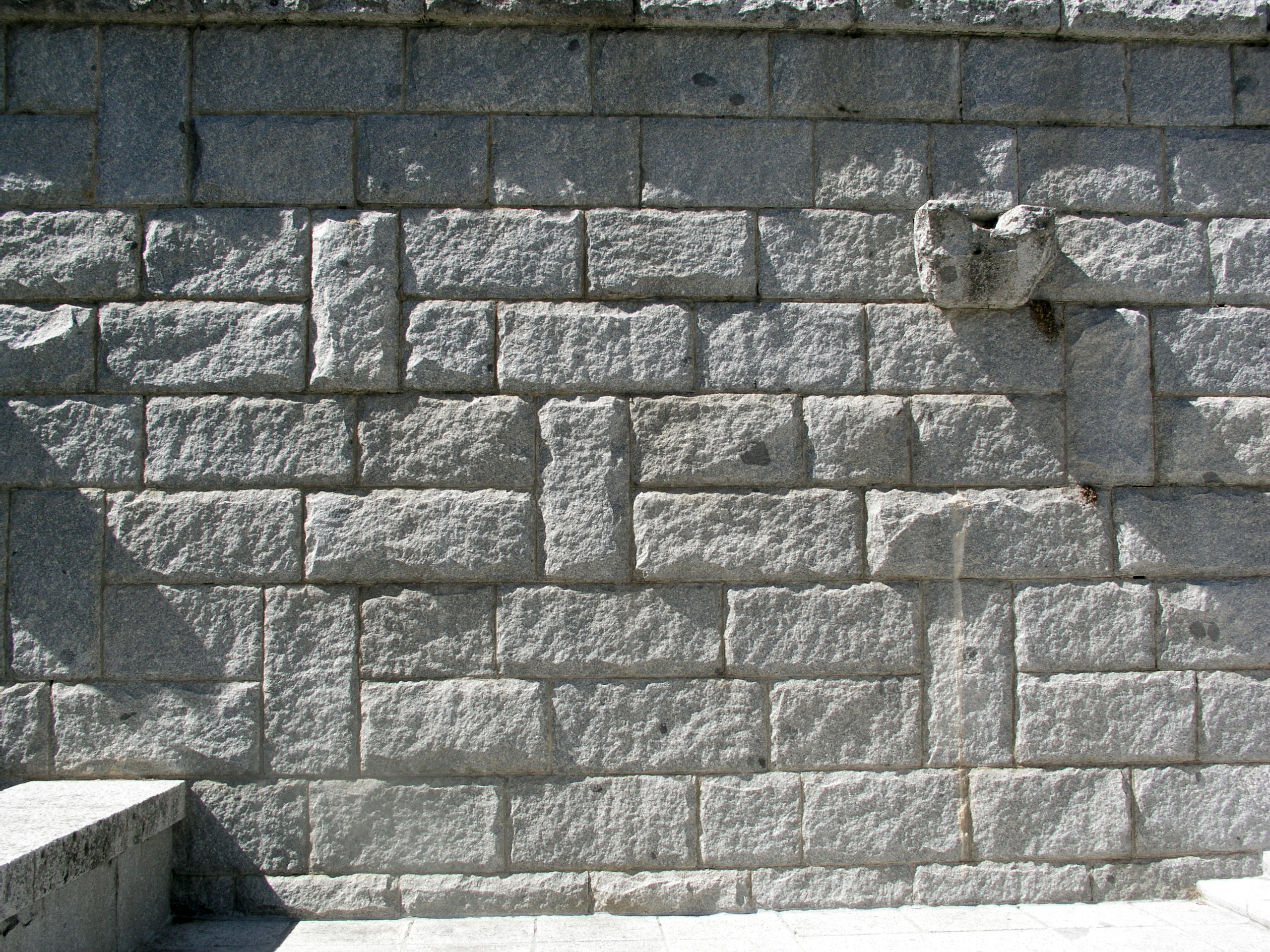 Valle de Los Caídos, Madrid, Spain. Stone wall, rustic.